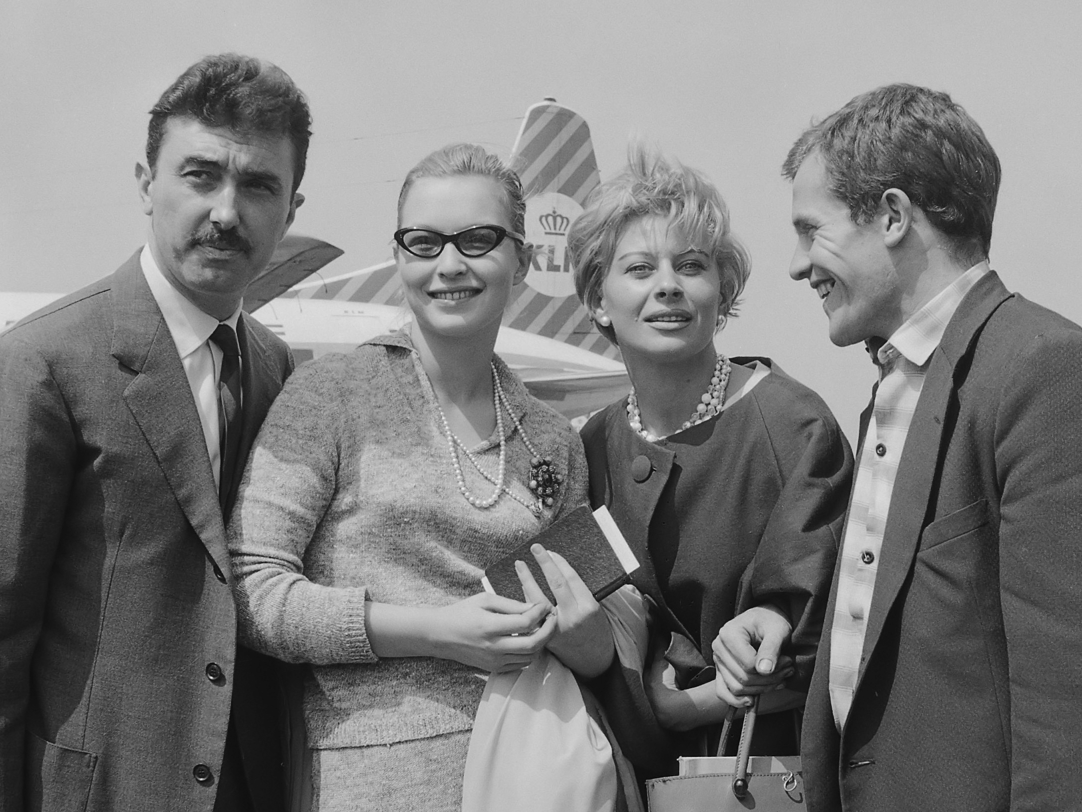 Aankomst Franse filmsterren op Schiphol, v.l.n.r. Luciano Emmer , Marina Vlady , Magali Noël en Bernard Fresson 1 juni 1960